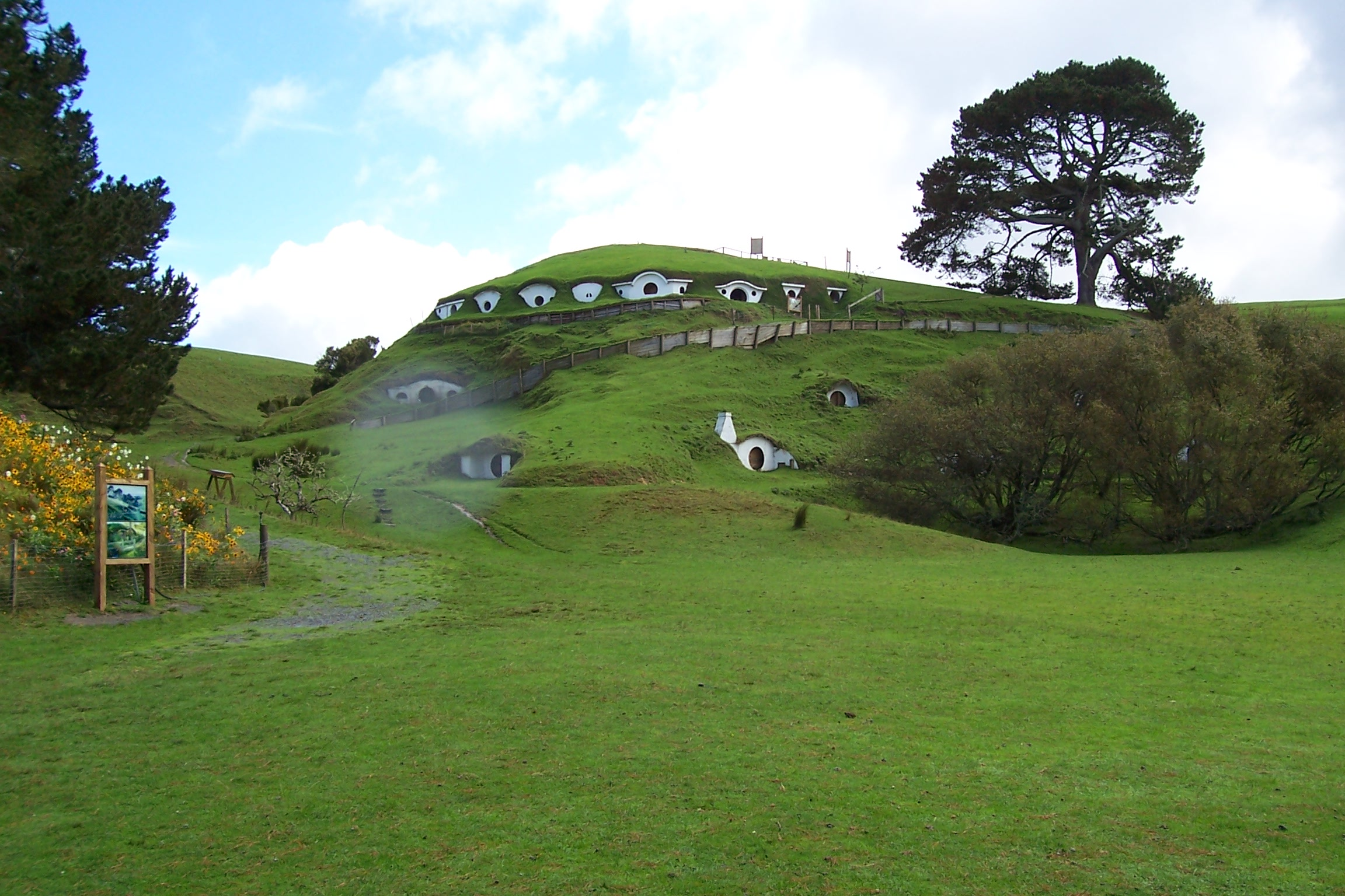 Herr der Ringe-Drehort "Hobbingen" in der Nähe von Matamata/NeuseelandSlovenčina: Miesto nakrúcania trilógie Pán prsteňov "Hobitov", v blízkosti Matamata, Nový Zéland